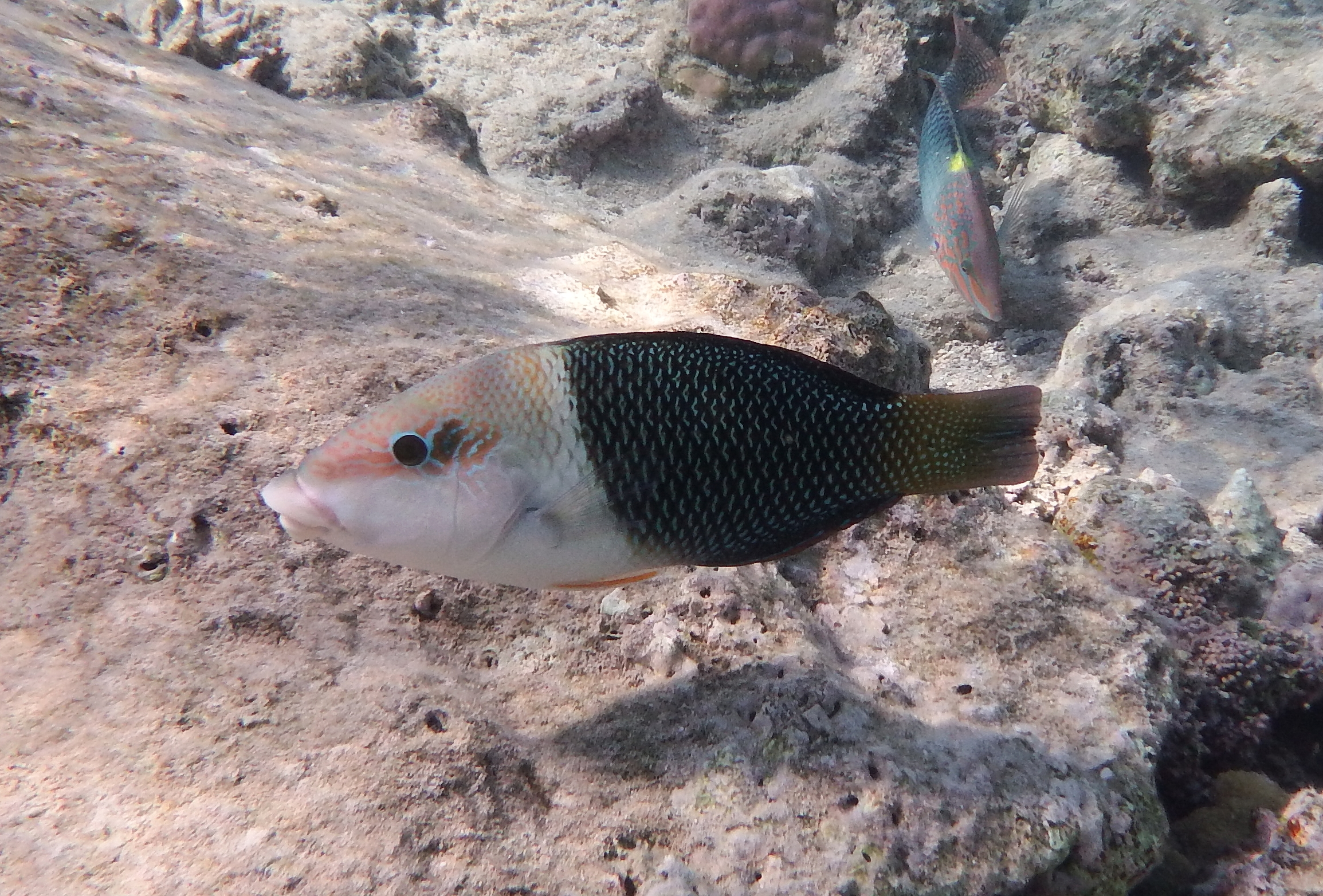 Hemigymnus melapterus im Roten Meer. Aufgenommen im Roten Meer in Ägypten, Makadi Bay. Hotel Grand Makadi Hausriff. VIDEO